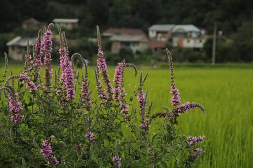 Ahoudasht-Sari-Mazandaran-Iran